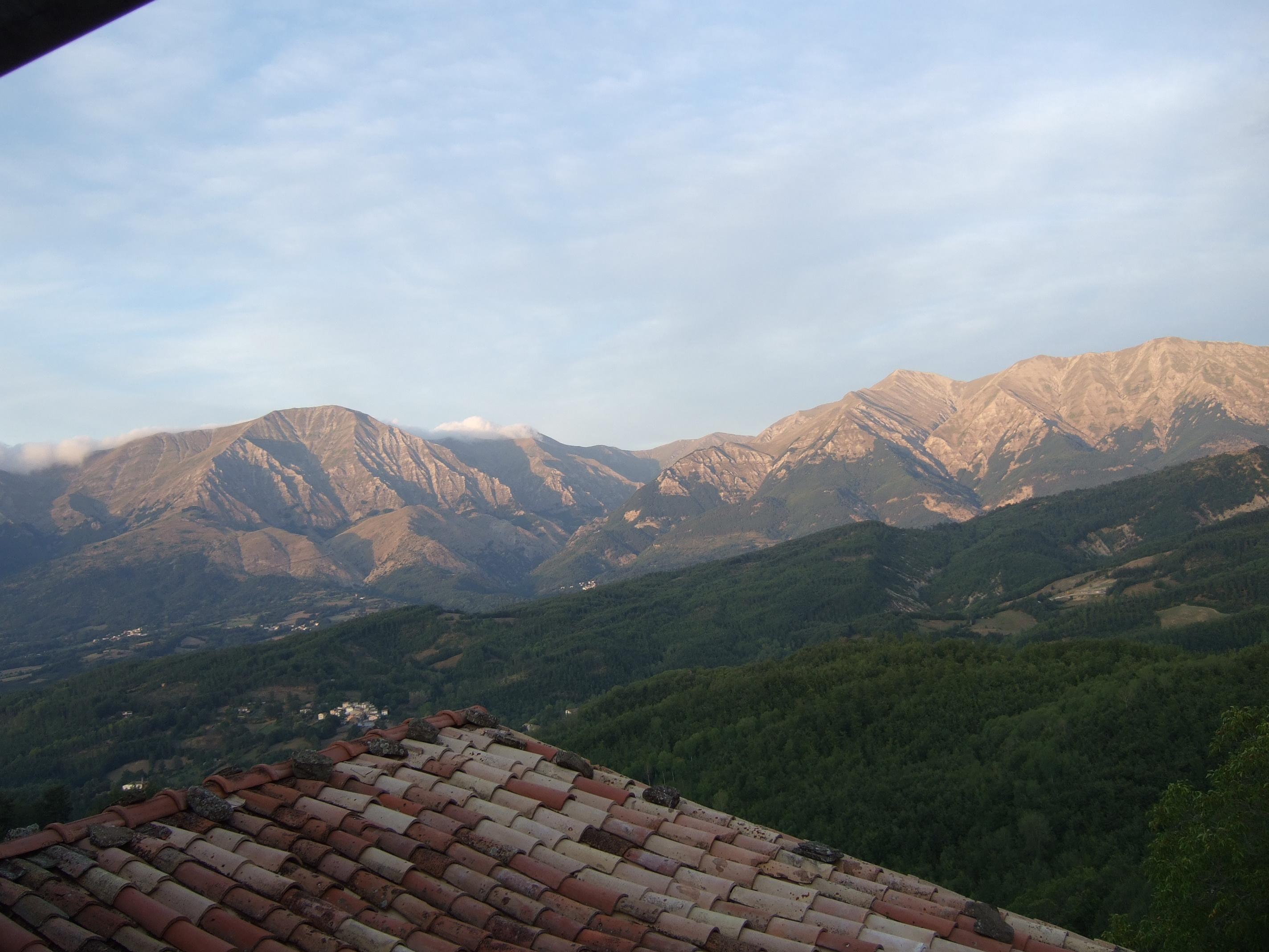 Monti della Laga - Vista al tramonto, Versante Ovest.. Da sinistra a destra: Monte Gorzano, Cima della Laghetta